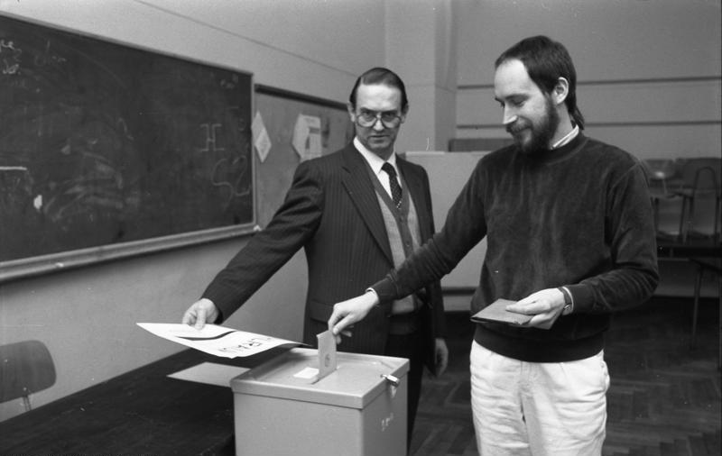 25.1.1987 Wahllokal in Bonn 9, Dorotheenstraße 126 Bürger bei der Stimmabgabe